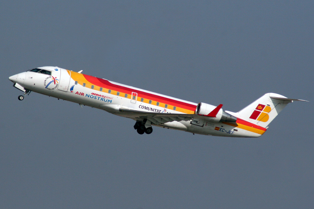 at Barcelona